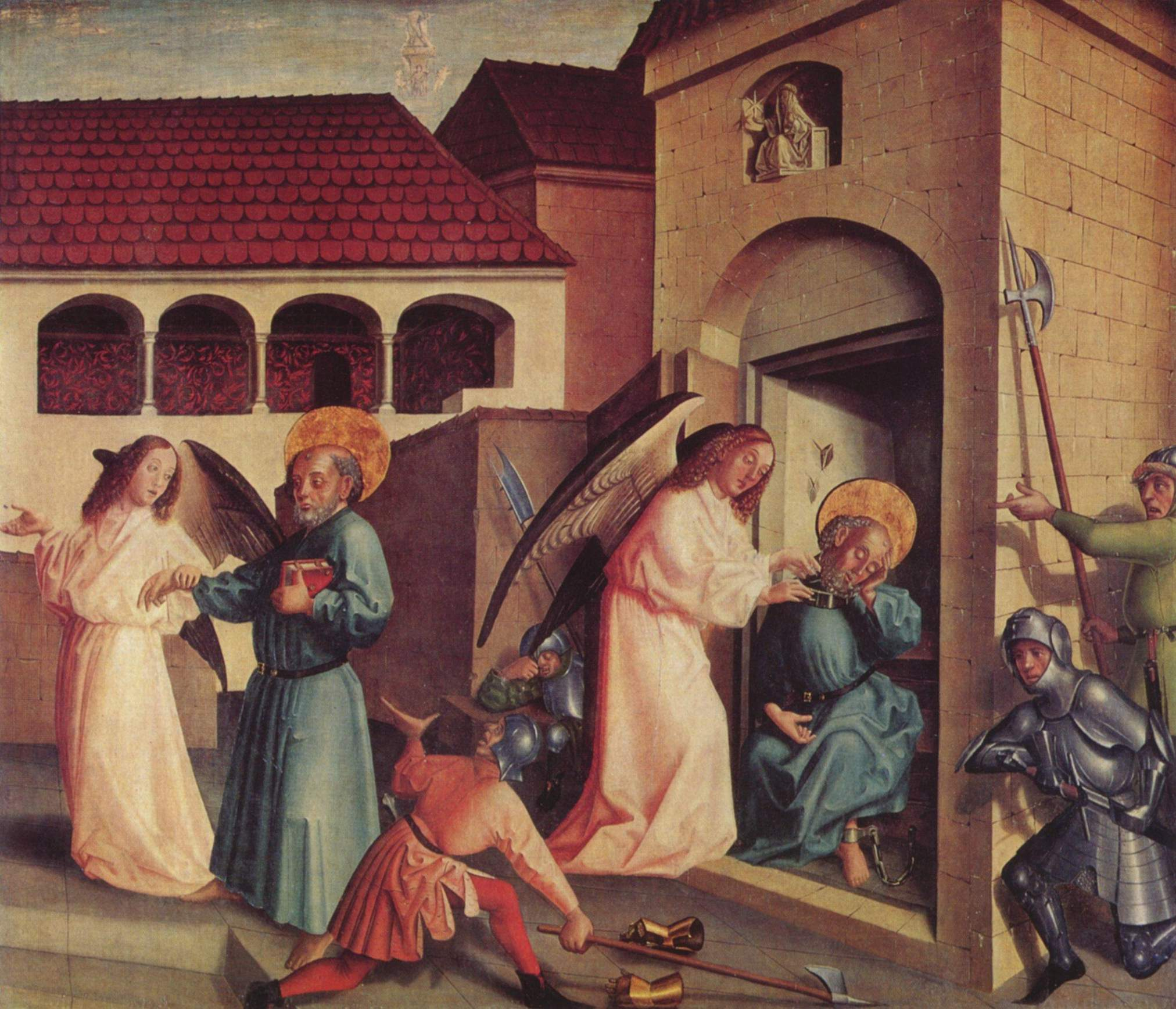 Petrusaltar, Fragment eines Altares der Petrus-Kathedrale in Genf, linker Flügel innen